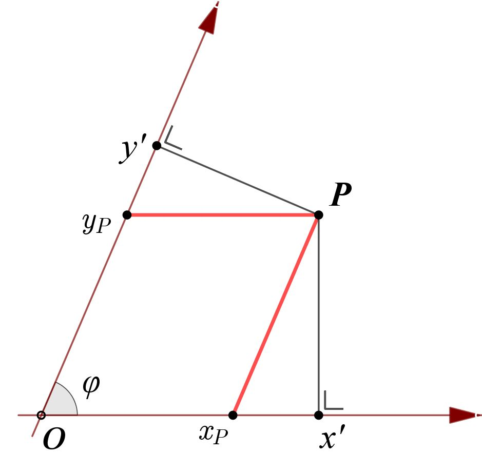 illustratie van het scheef coördinatenstelsel in het platte vlak